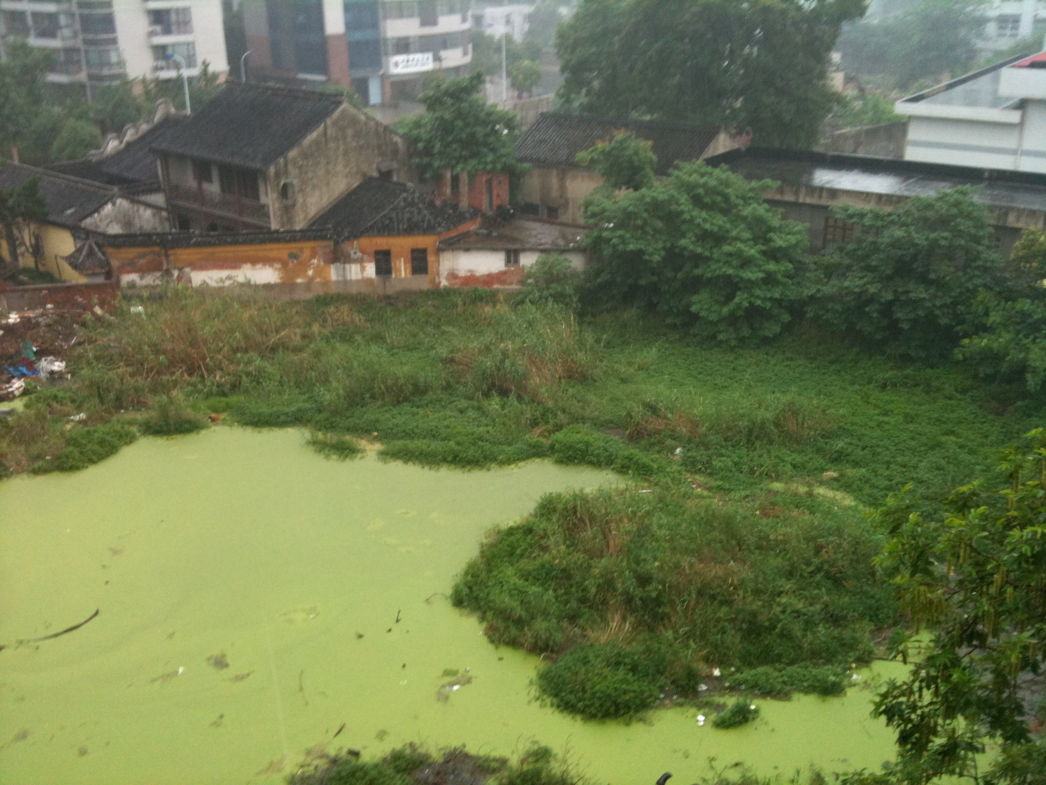 中文（中国大陆）: 常州关刀河